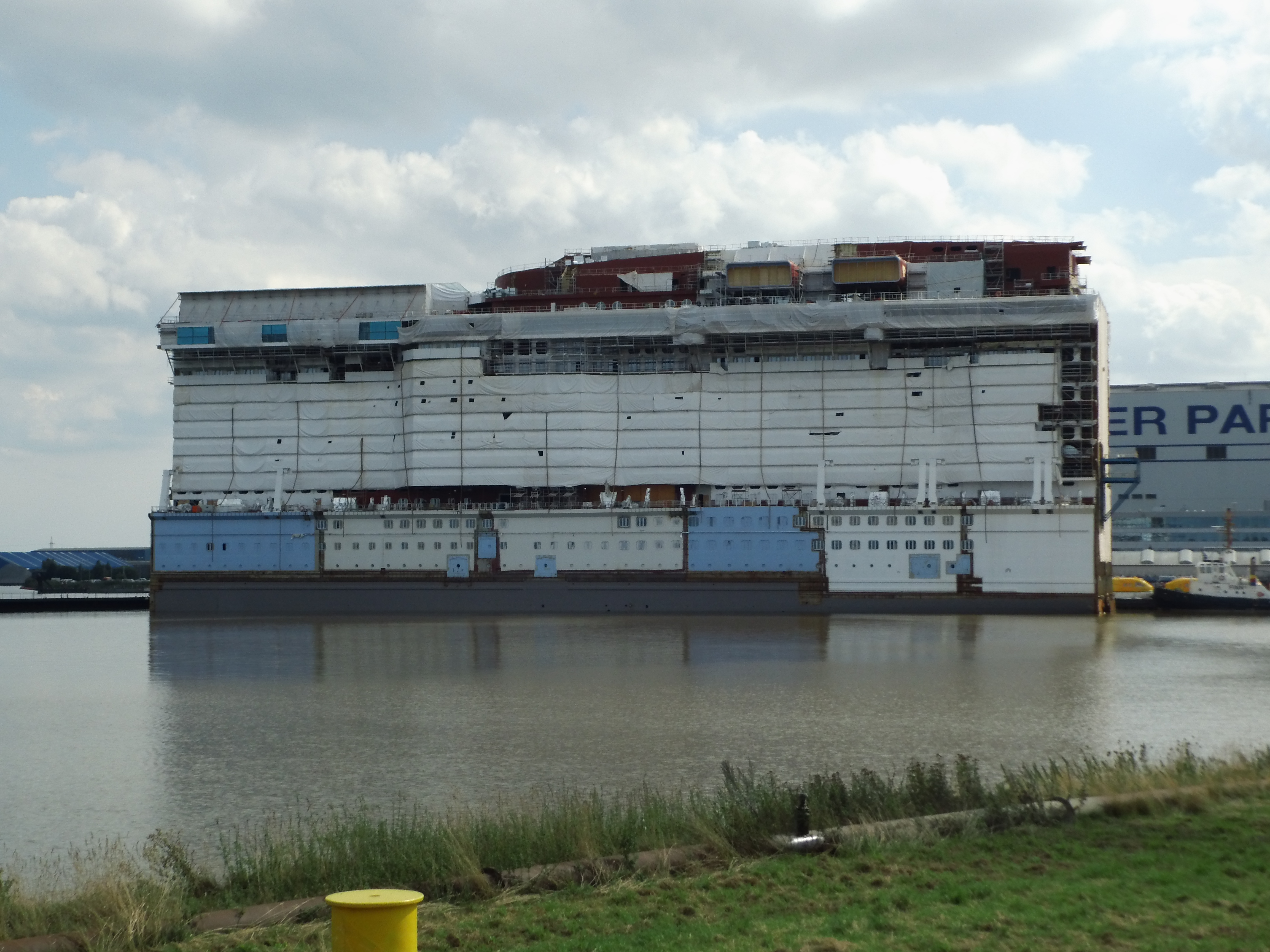 Part of Spectrum of the Seas at Meyer Weft.